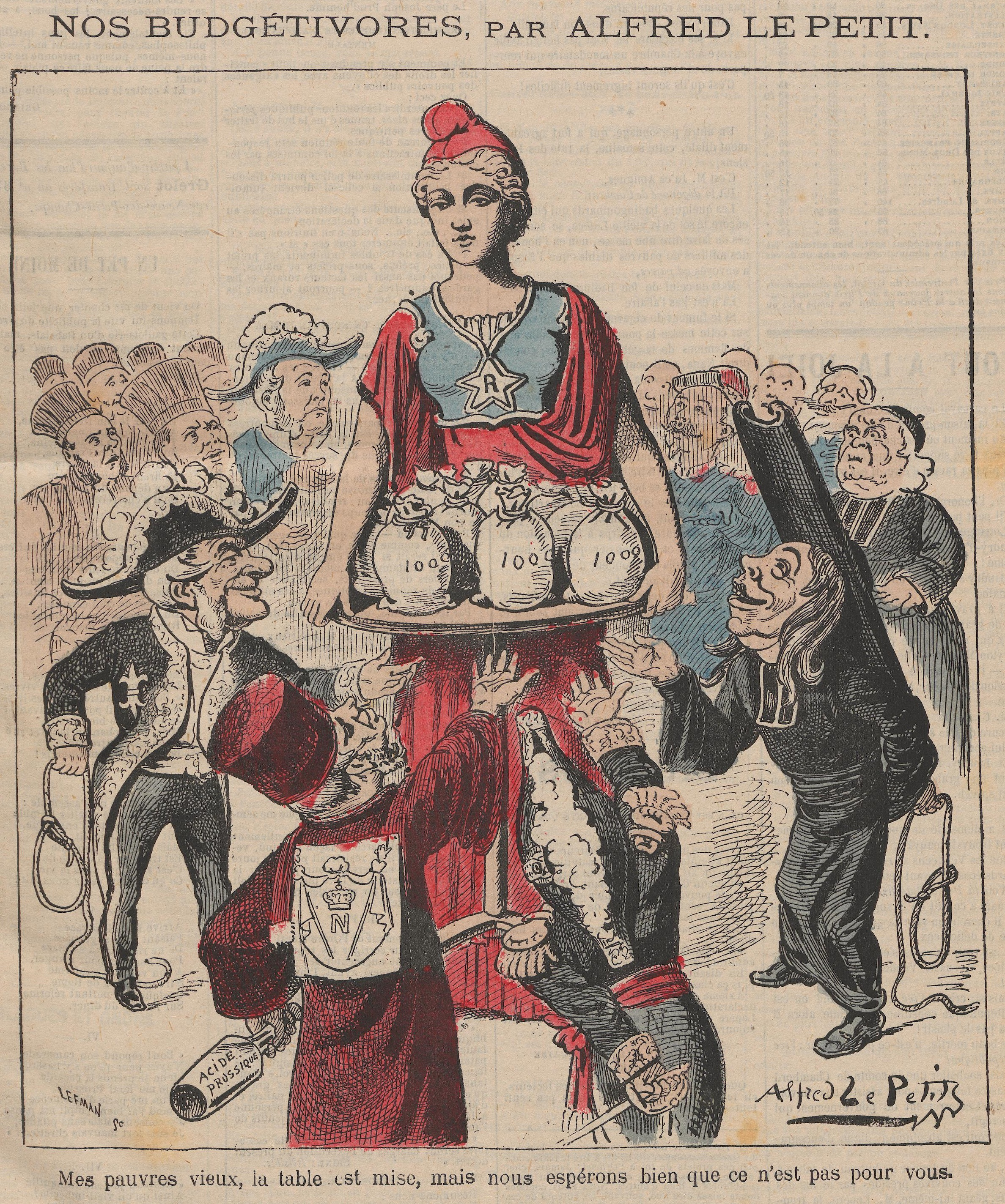 "Nos budgétivores".